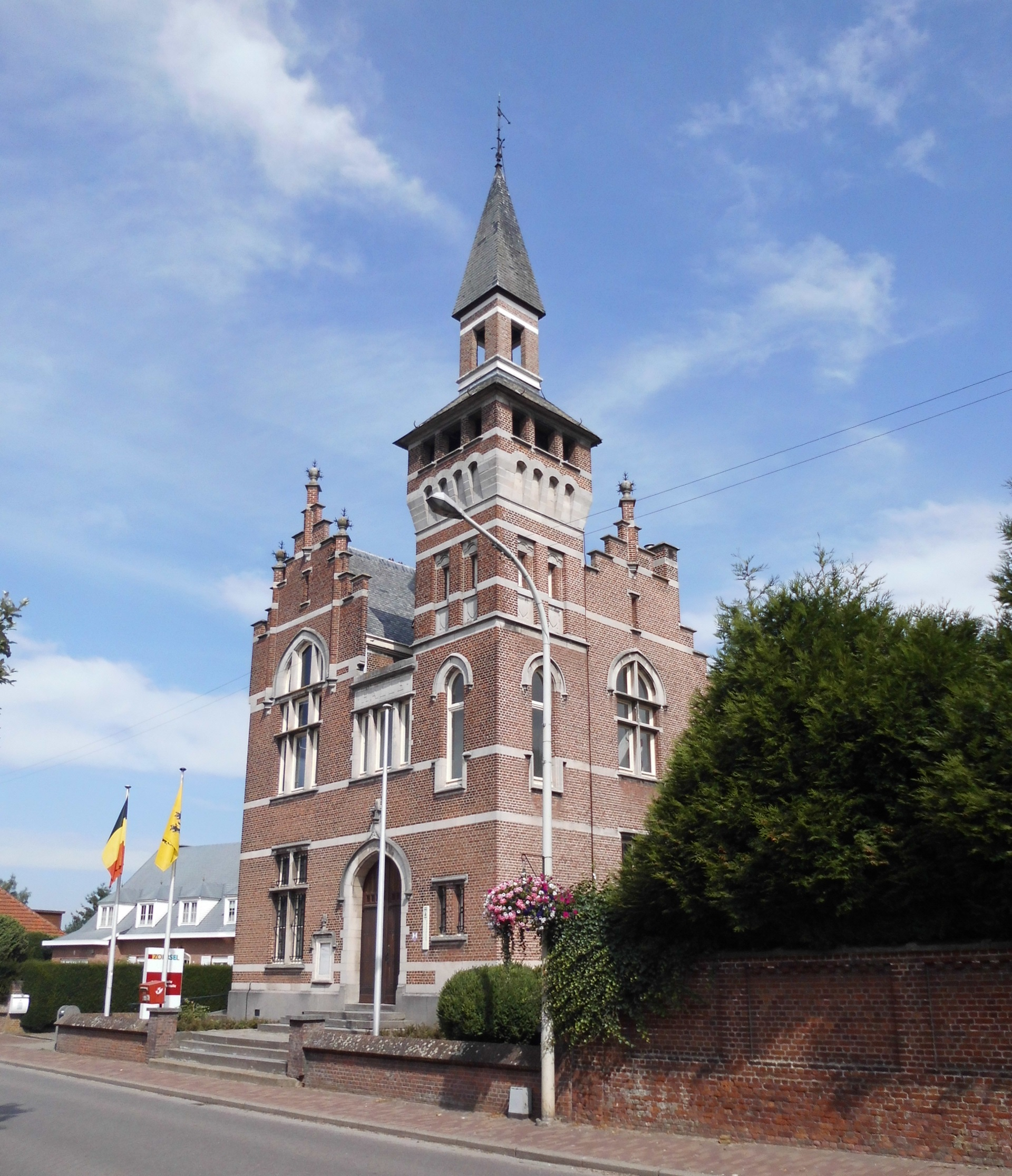 Gemeentehuis van Halle - Halle-Dorp - Halle - Zoersel - Provincie Antwerpen - België